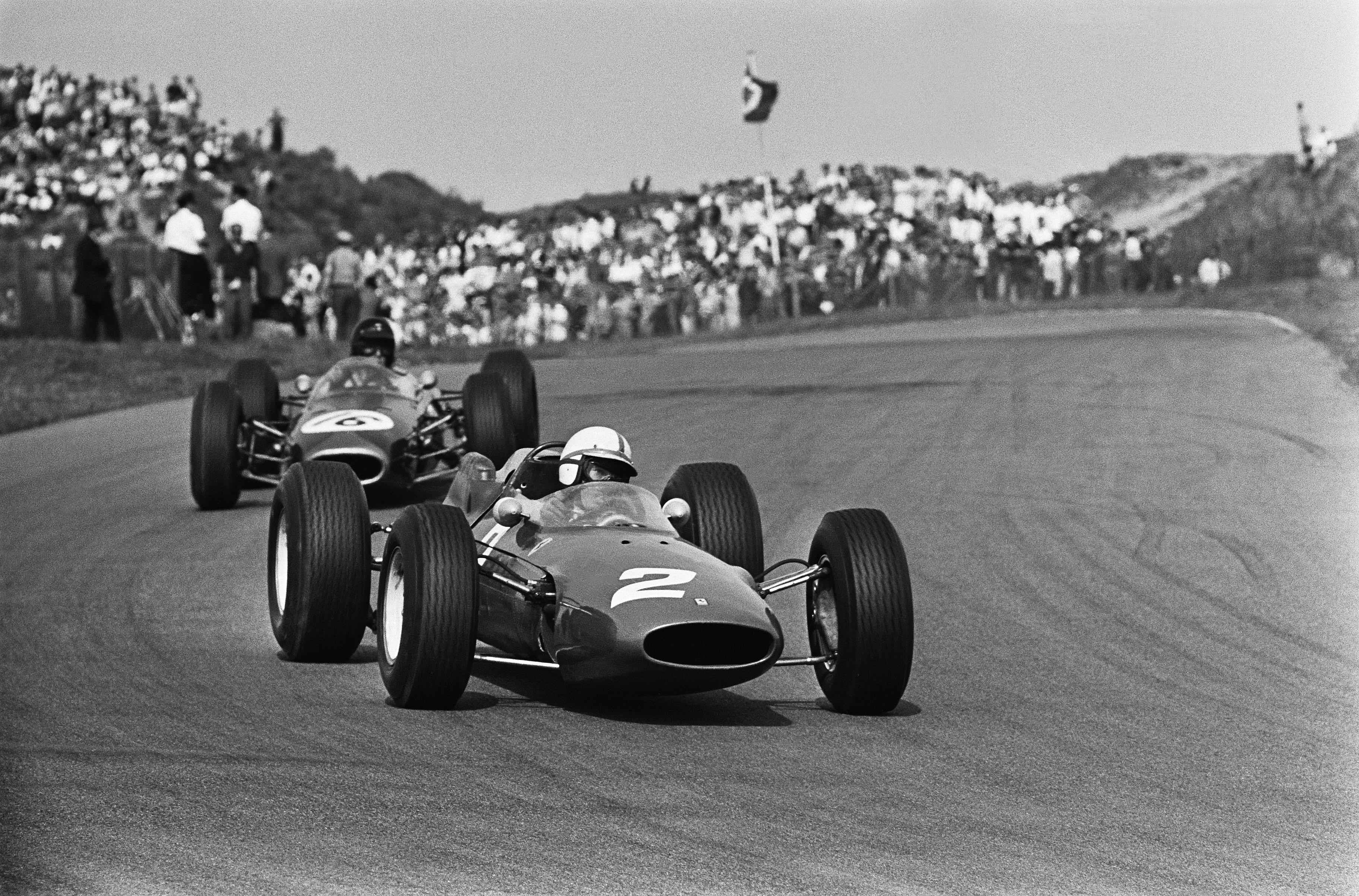 Grand Prix van Nederland, het rennersveld Jim Clark.